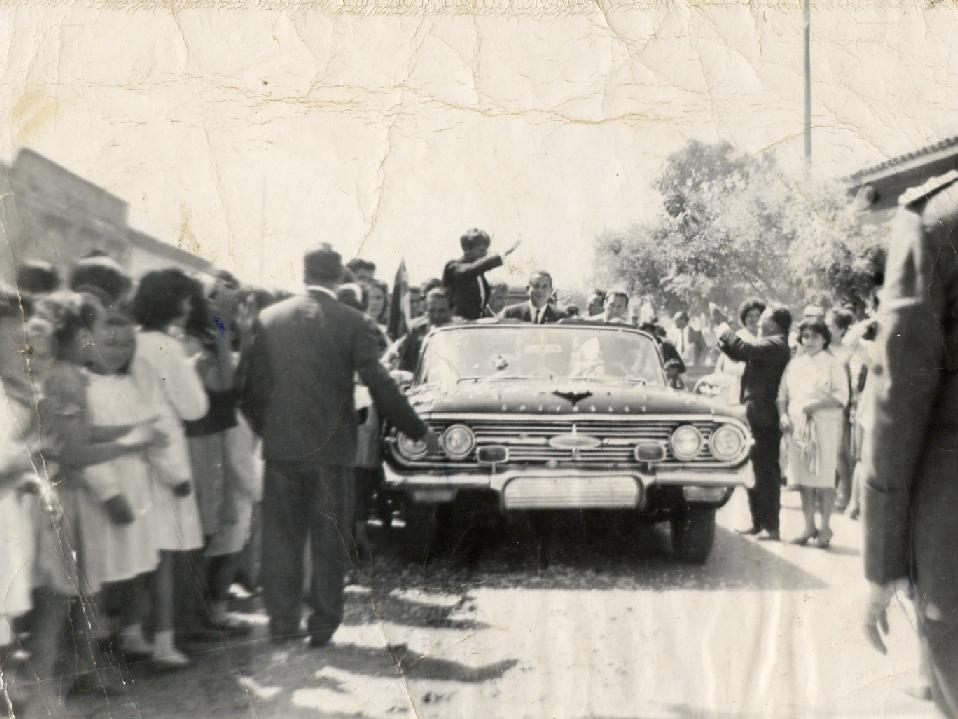 Esta imagen fue tomada en la plaza de armas de linares cuando éste personaje visitó la zona con motivo dela promoción de la alianza por el progreso y la intensificación de la Reformna Agraria en Latinoamérica.